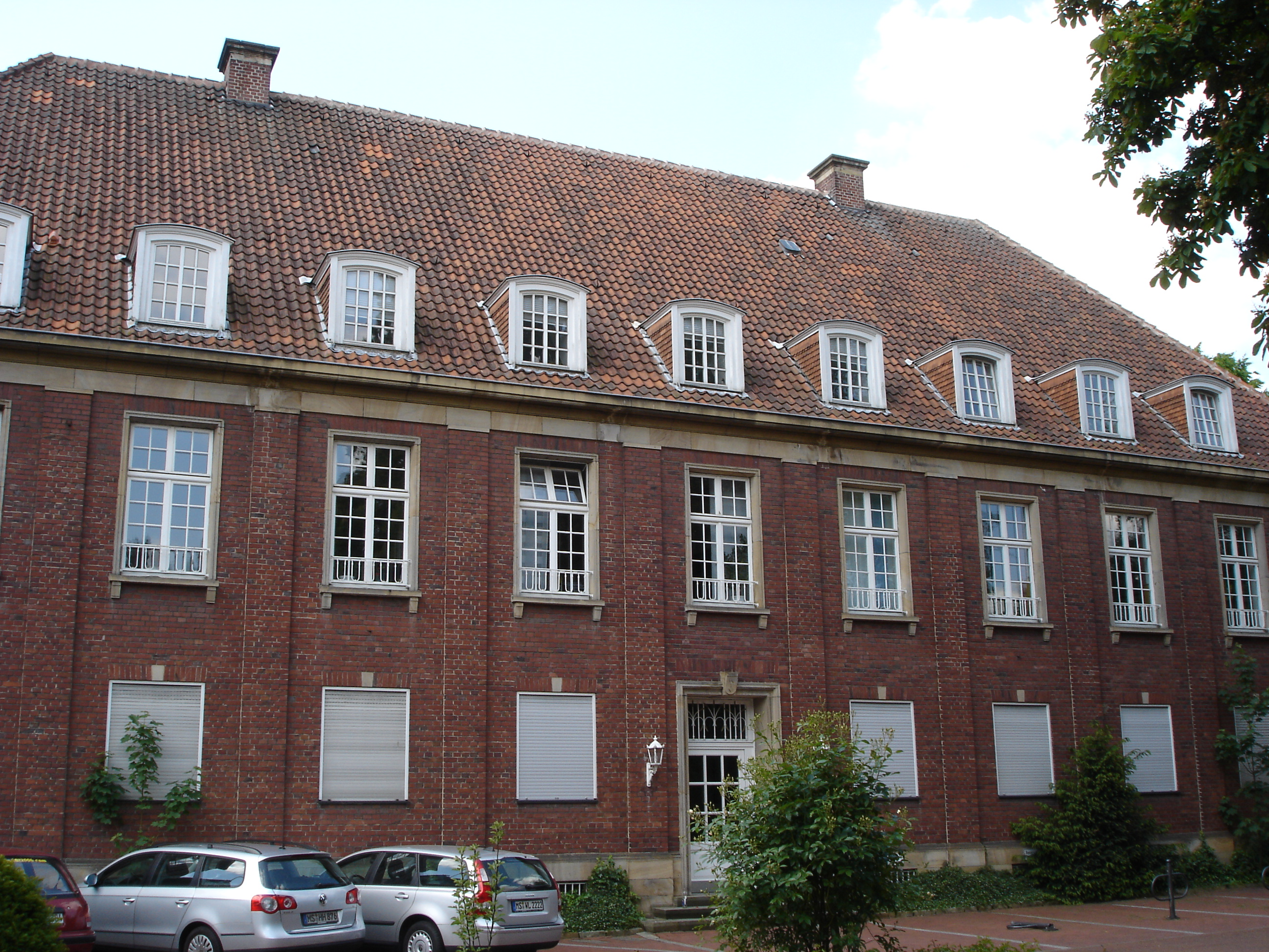 Gebäude des Westfälisch-Lippischen Landwirtschaftsverbands in der Schorlemerstraße 15, Münster, Westfalen, Deutschland